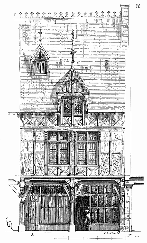 ... Voici (26) une maison de Beauvais qui présentait cette disposition. Au rez-de-chaussée était un portique avec boutiques en arrière, ainsi qu'on en voit encore à Reims. Le premier étage sur la rue se composait de deux pièces auxquelles on montait par un escalier à vis disposé au fond de l'allée A. Sous le comble était une grande pièce éclairée par deux lucarnes, une sur la rue, l'autre sur une petite cour. Cette habitation datait du commencement du XVe siècle. Il existe encore quelques maisons de ce genre à Orléans, sauf le portique ...